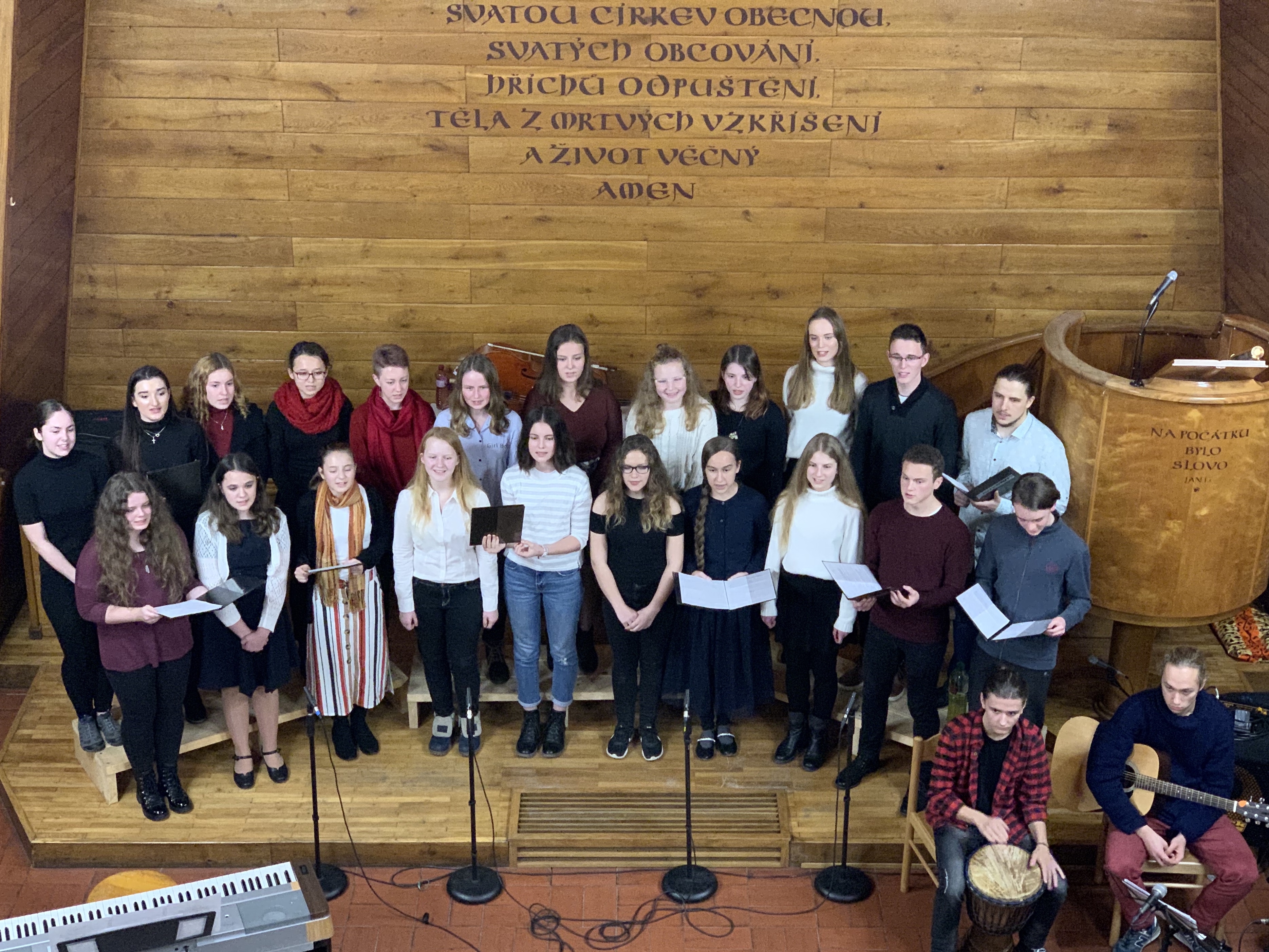 Tradiční vánoční koncert smíšeného pěveckého sboru Juventus při Gymnáziu v Rožnově pod Radhoštěm. Sbormistryně Mgr. Kateřina Turzová